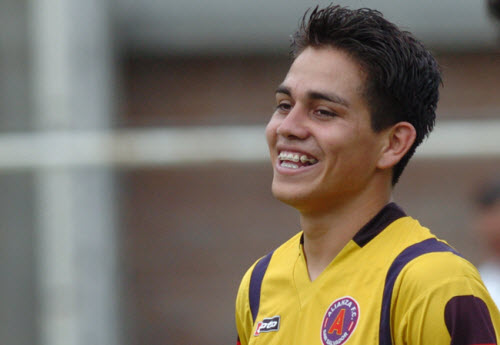 Rodolfo Zelaya en el entreno de Alianza F.C.